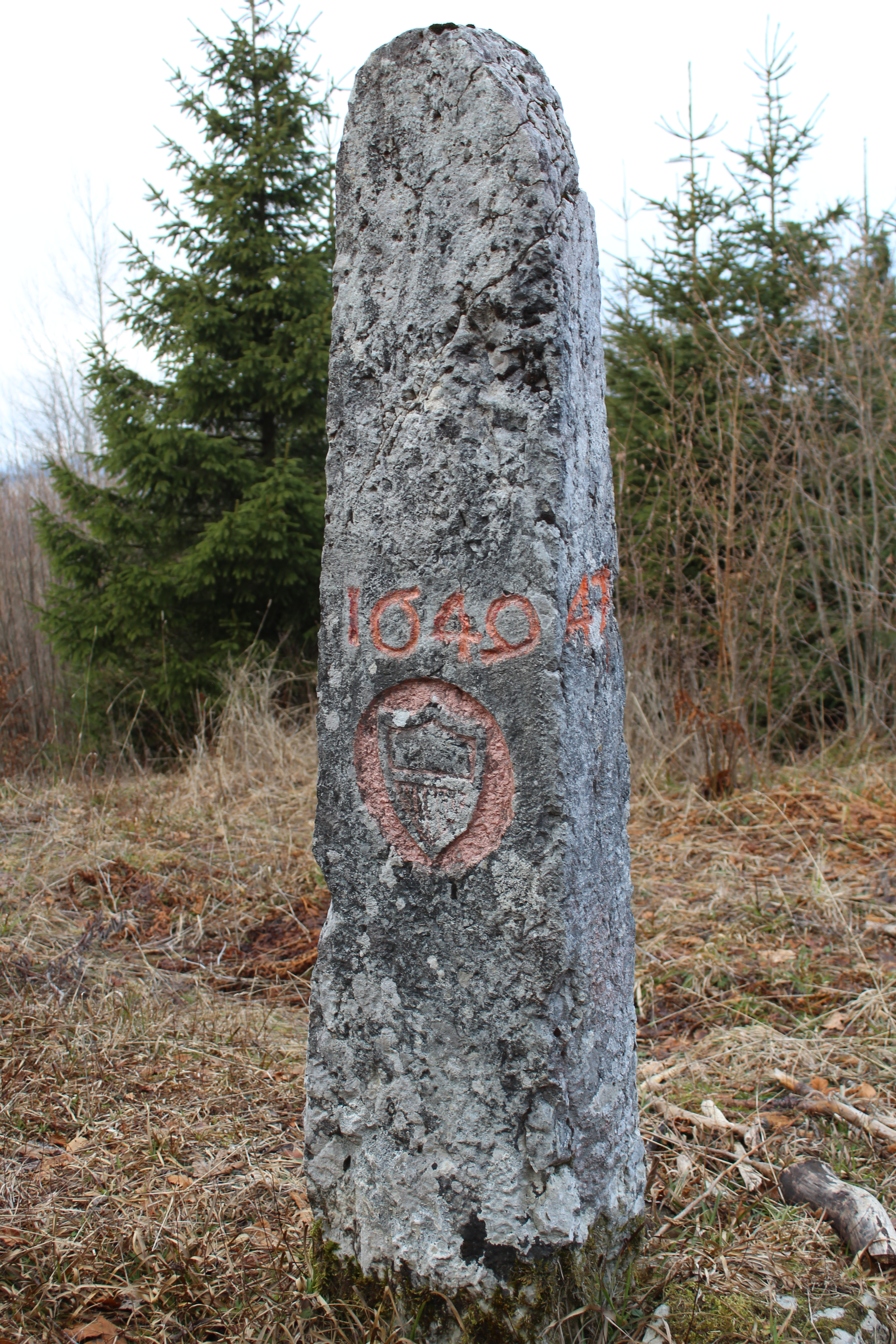 Borne frontière franco-suisse Canton de Vaud N° 47 côté suisse